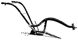 Svängårder. En årder är ett plöjningsredskap som inte har någon vändskiva.